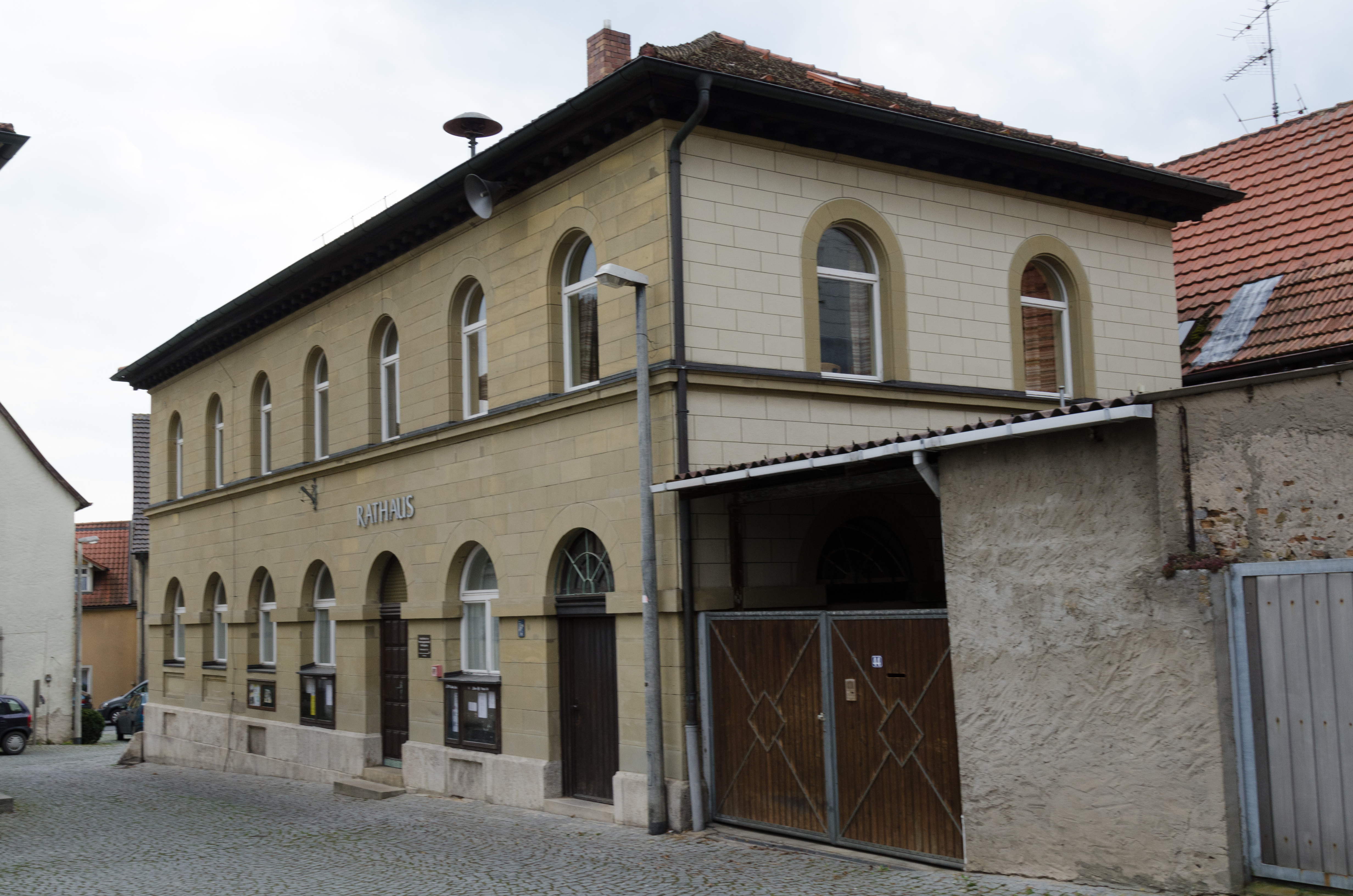 Großlangheim, Hauptstraße 42